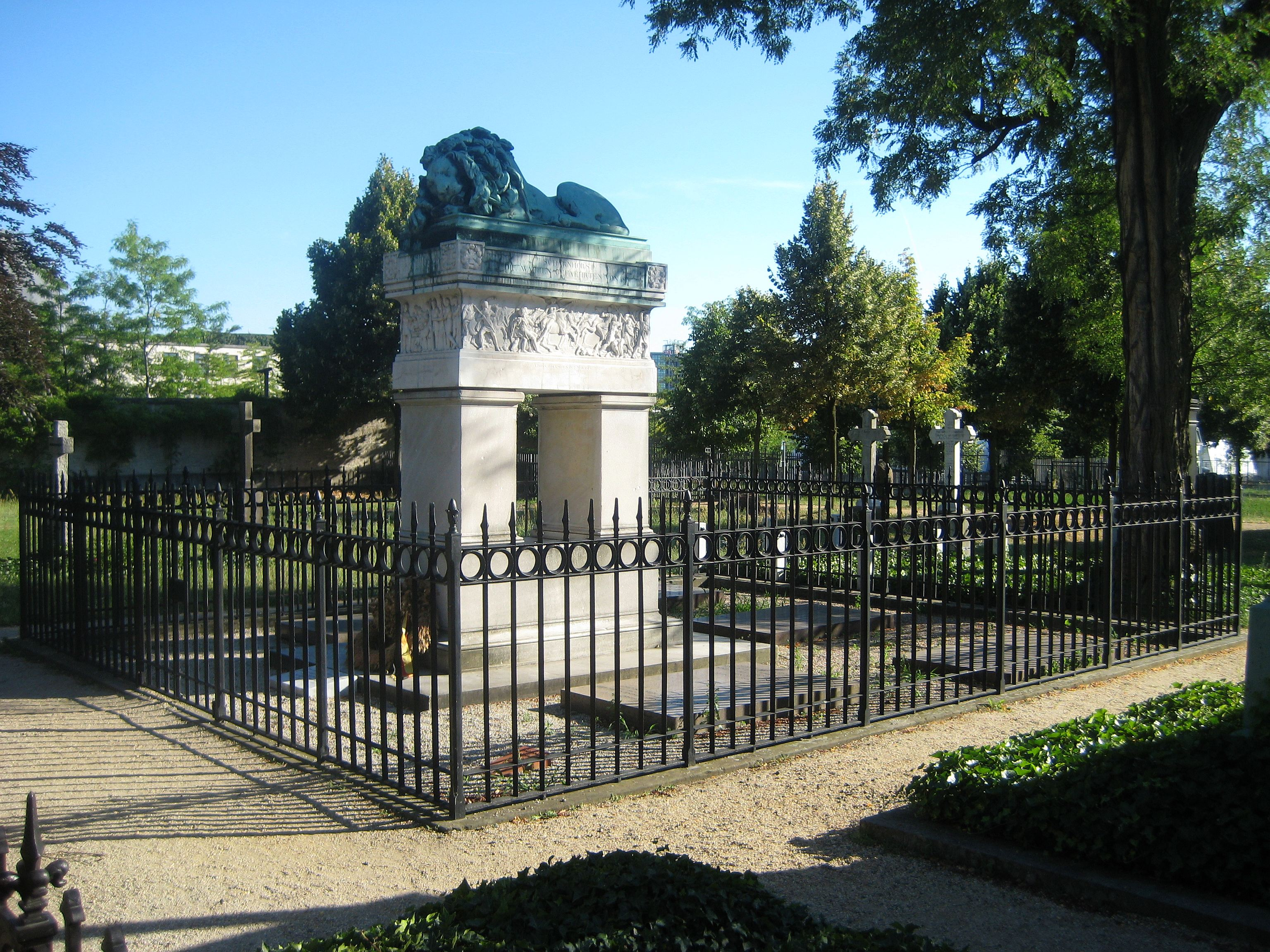 grave of Gerhard von Scharnhorst on Invalidenfriedhof cemetery in Berlin, designed by Karl Friedrich Schinkel, Friedrich Tieck and Christian Daniel Rauch (1834)